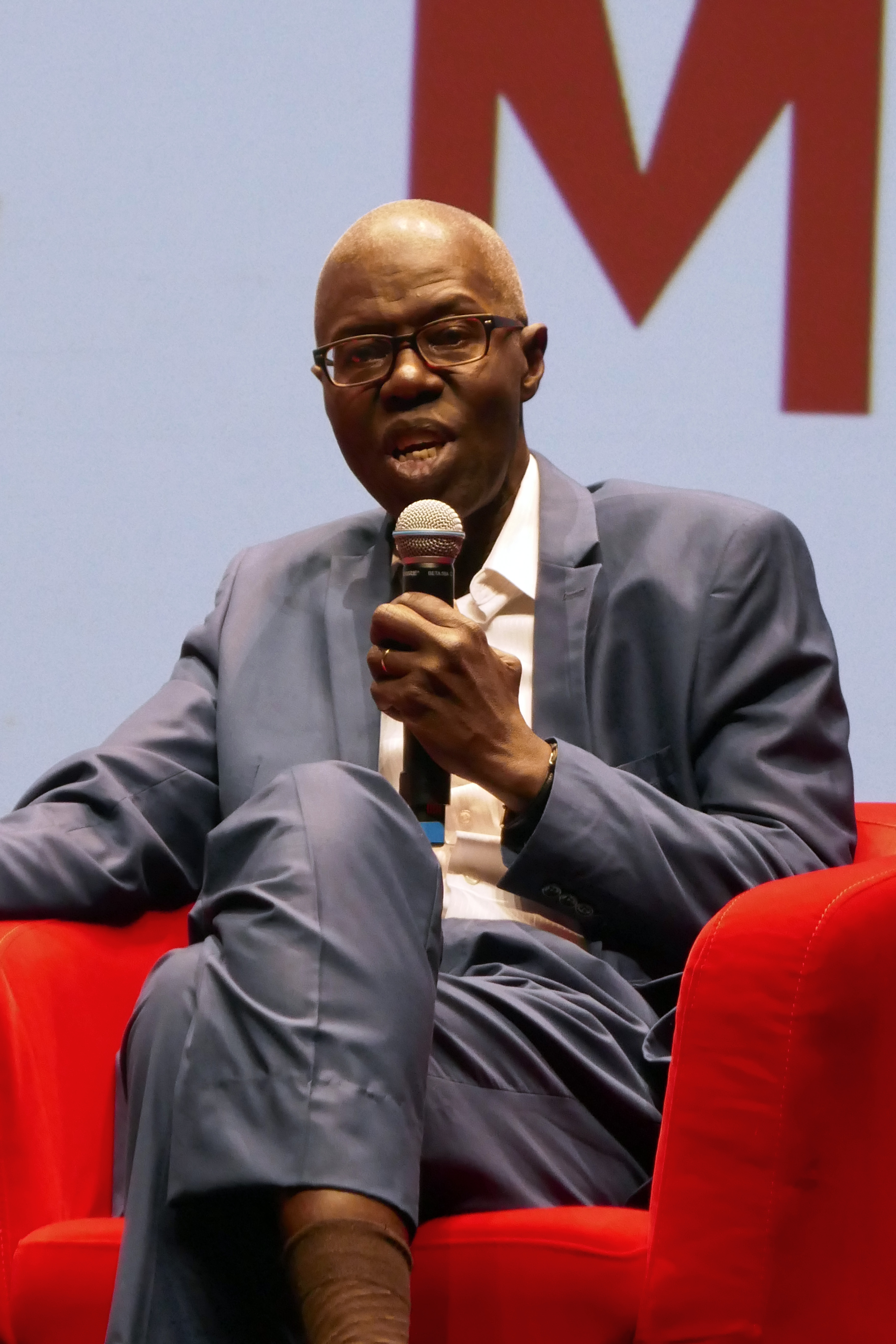 Le philosophe sénégalais Souleymane Bachir Diagne, professeur à l'université Columbia de New-York, présentant son ouvrage En quête d'Afrique(s), coécrit avec l'anthropologue français Jean-Loup Amselle, dans le cadre des Bibliothèques idéales, à la Cité de la Musique et de la Danse à Strasbourg.